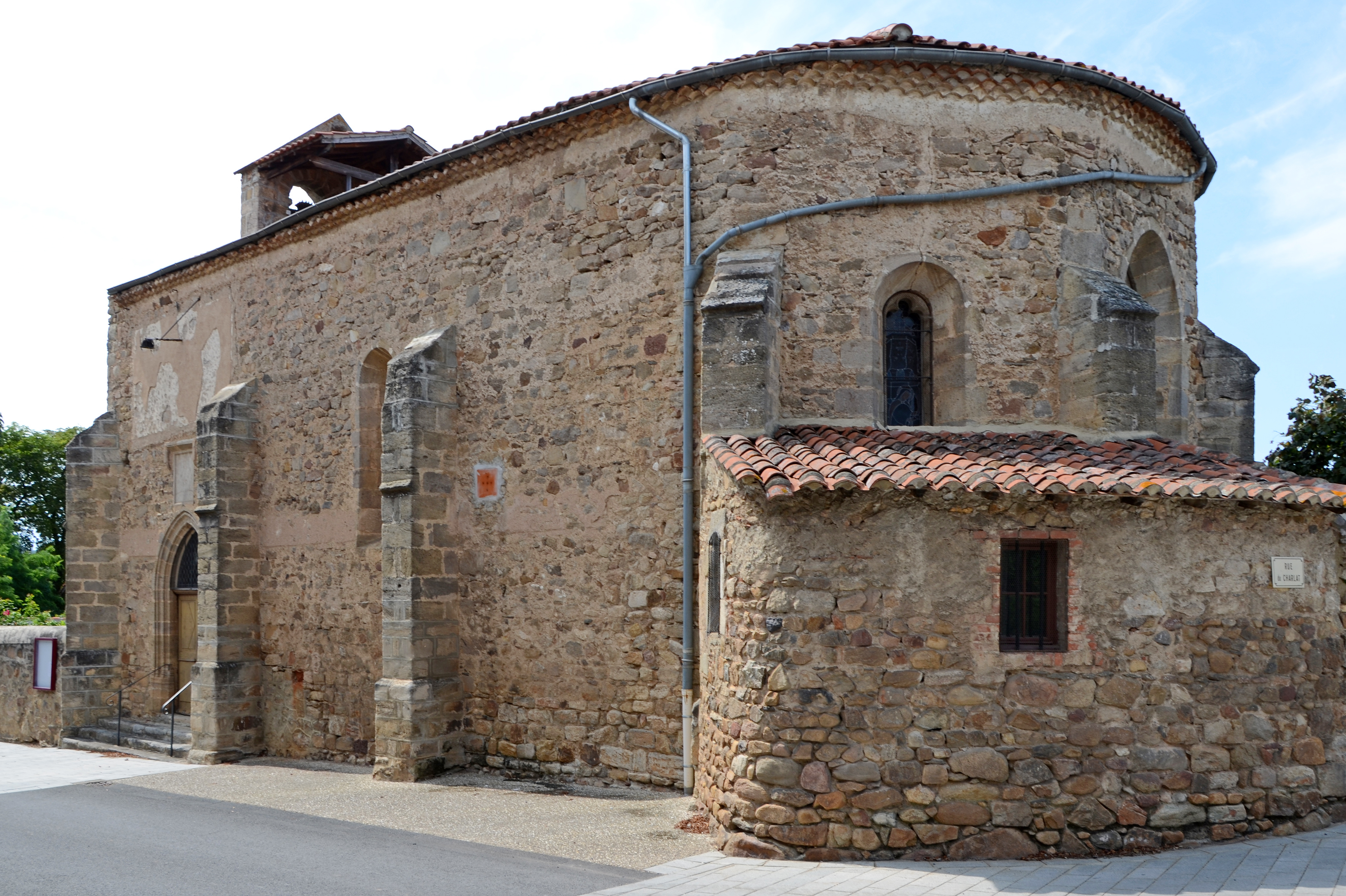 Eglise de Paulhac, Haute-Loire, France .